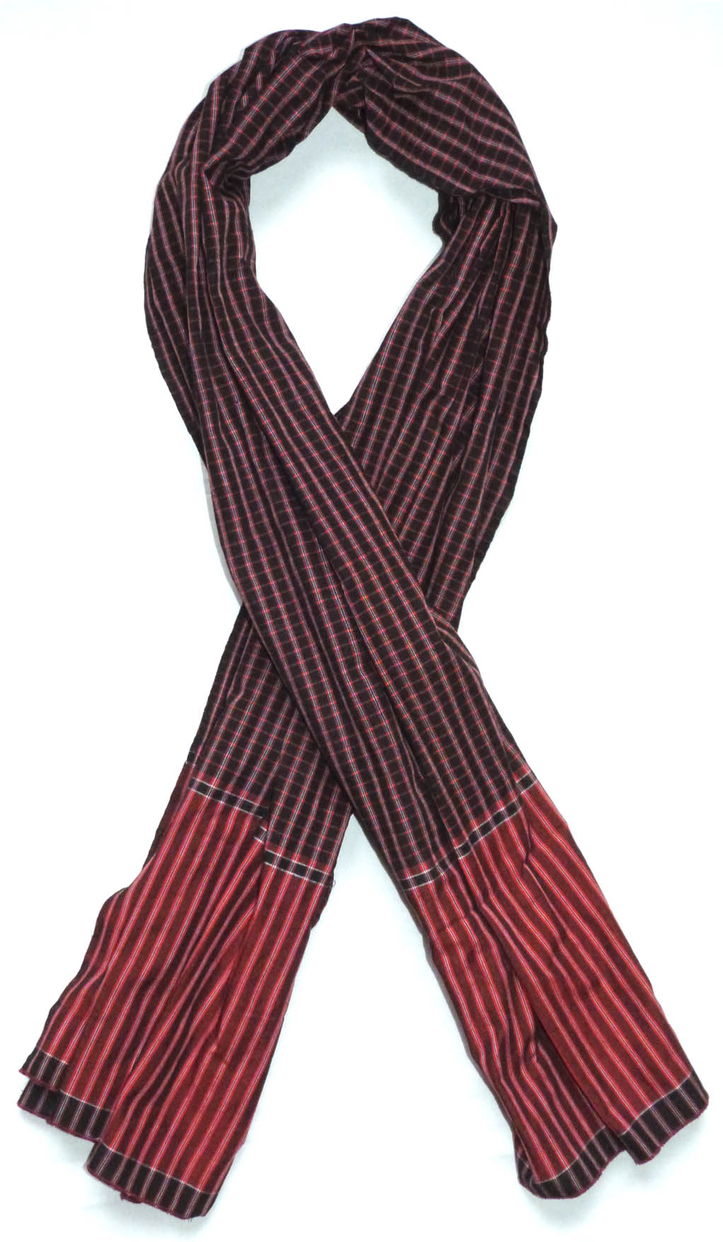 Un krama unique au Cambodge de par ses dimensions et son rouge obtenu à partir de la plante "Thleah"